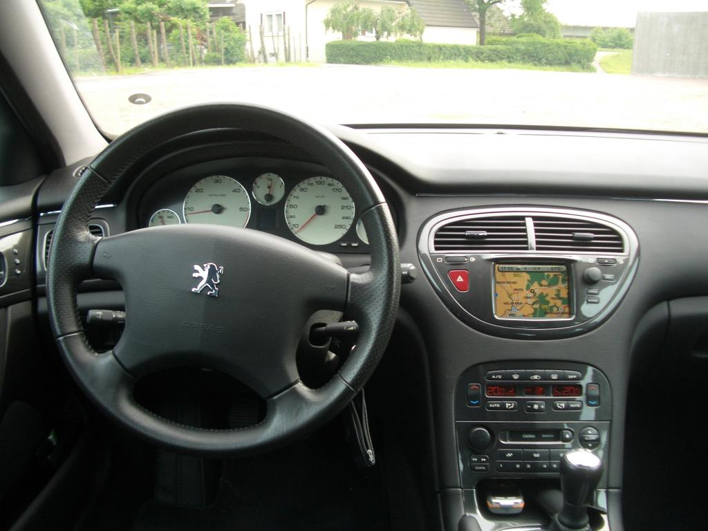 Innenraum des Peugeot 607 mit Navigationssystem (für die GNU FDL)